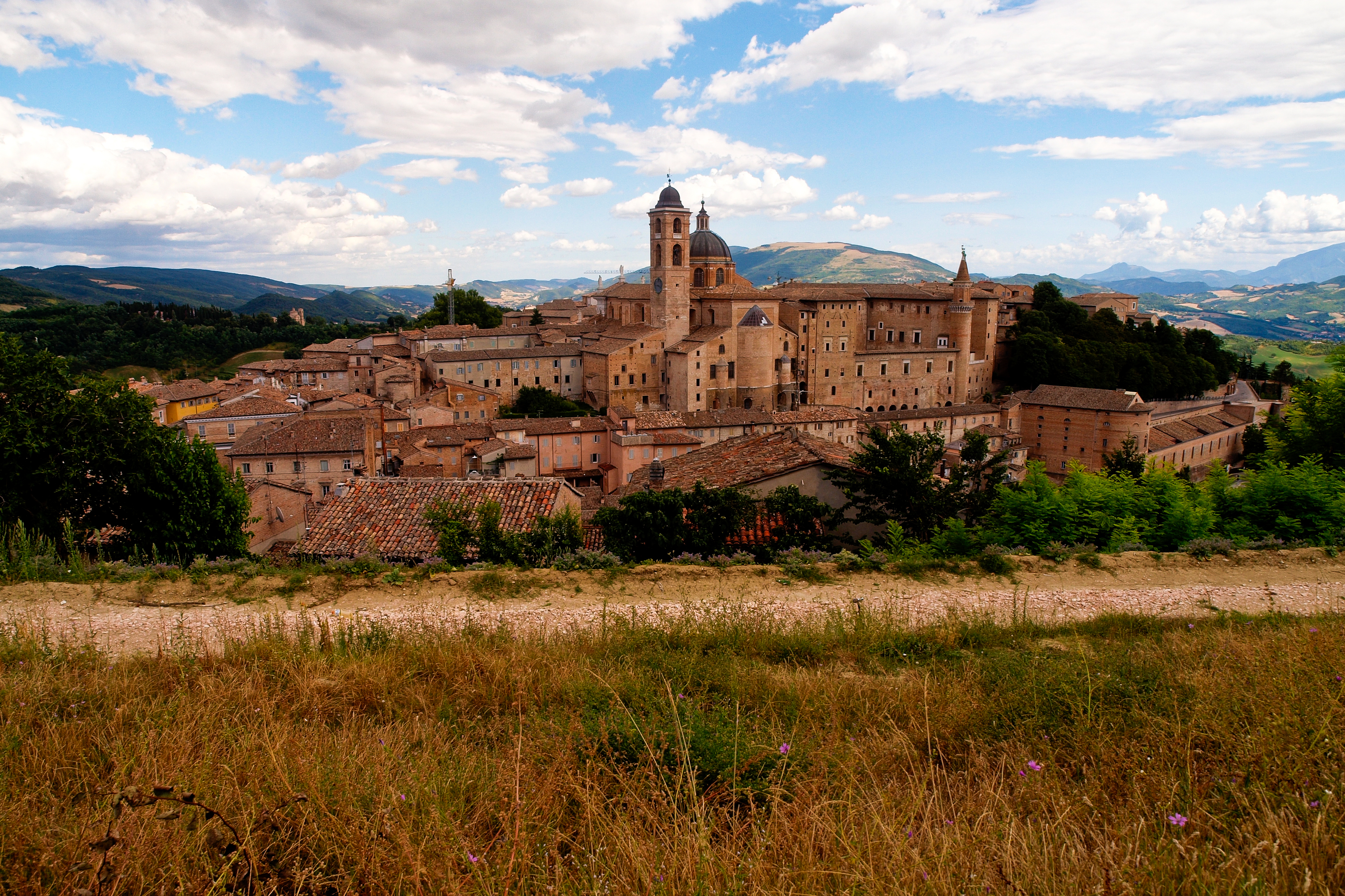 Vista generale del centro storico di Urbino, Italia.